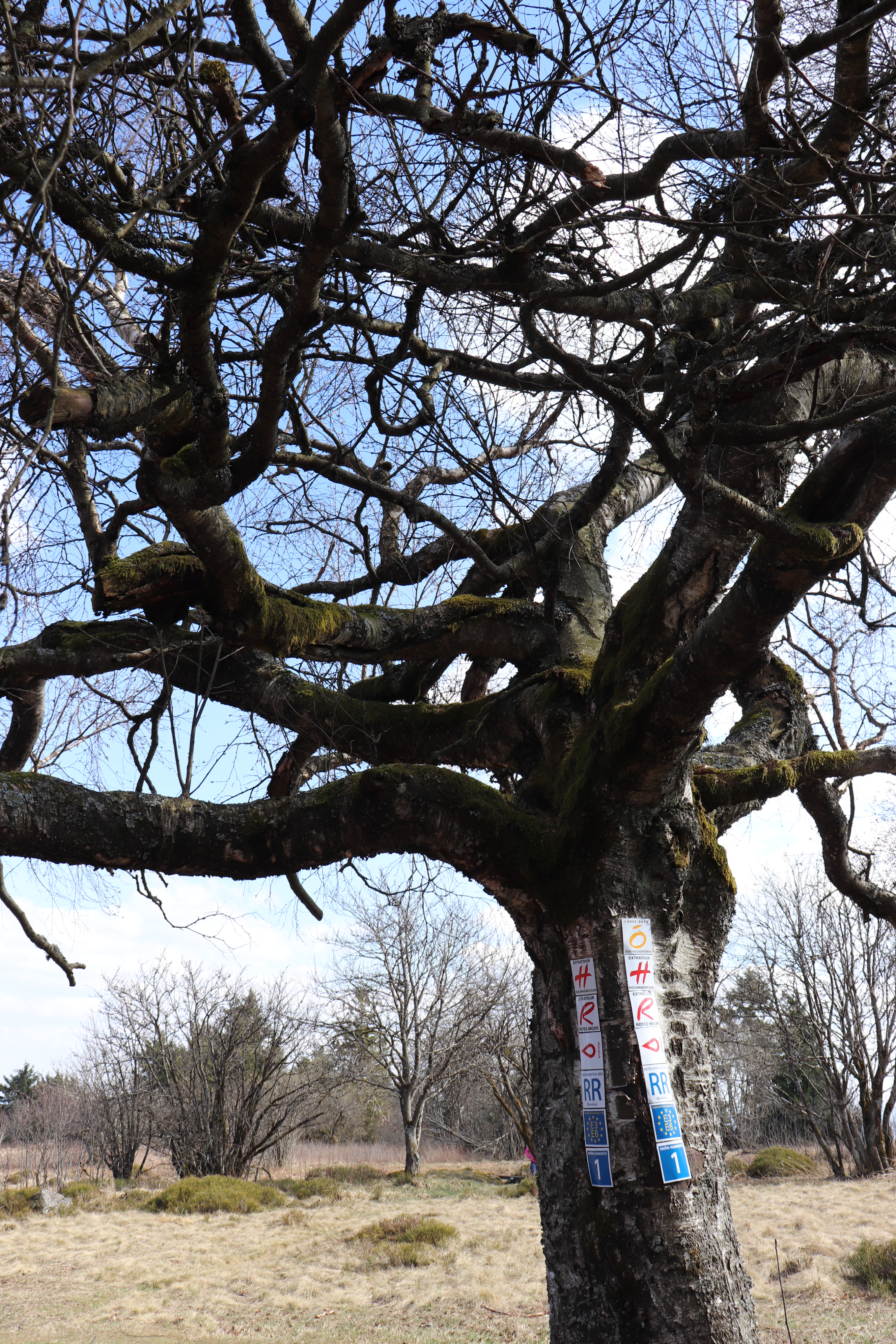 Hochrhön, Baum, Hochrhön Extratour